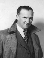 Mieczysław Krawicz (1893-1944) - polski reżyser filmowy. Fotografia portretowa w płaszczu, 1934.